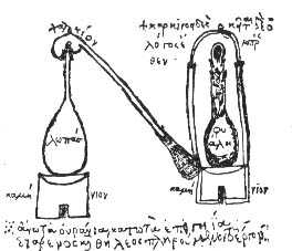 Från ett medeltida manuskript, publicerad i M. Berthelots "Collection des anciens alchimistes grecs" i slutet av 1800-talet.